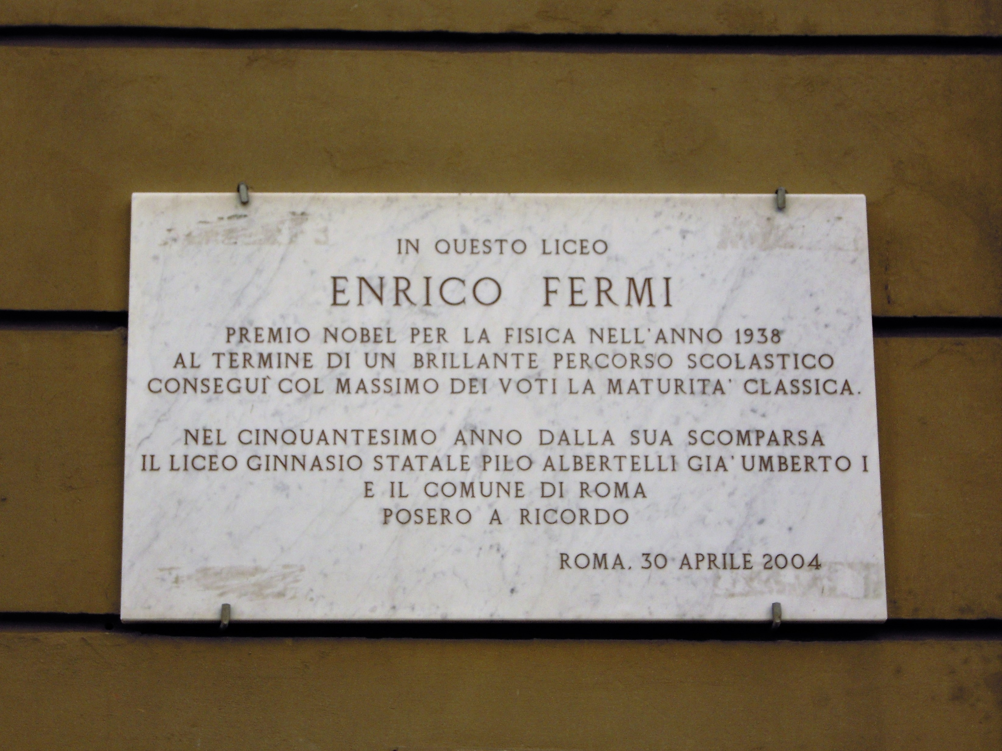 Roma, via Daniele Manin 72: lapide commemorativa della maturità classica conseguita da Enrico Fermi presso il Liceo Umberto I